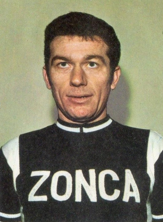 Ciclismo SPRINT '71- PANINI -Figurina n.146- PORTALUPI - ITALIA -Rec